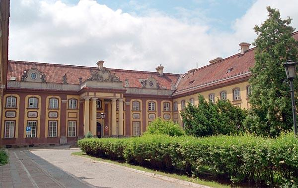 Branicki Palac in Warsaw